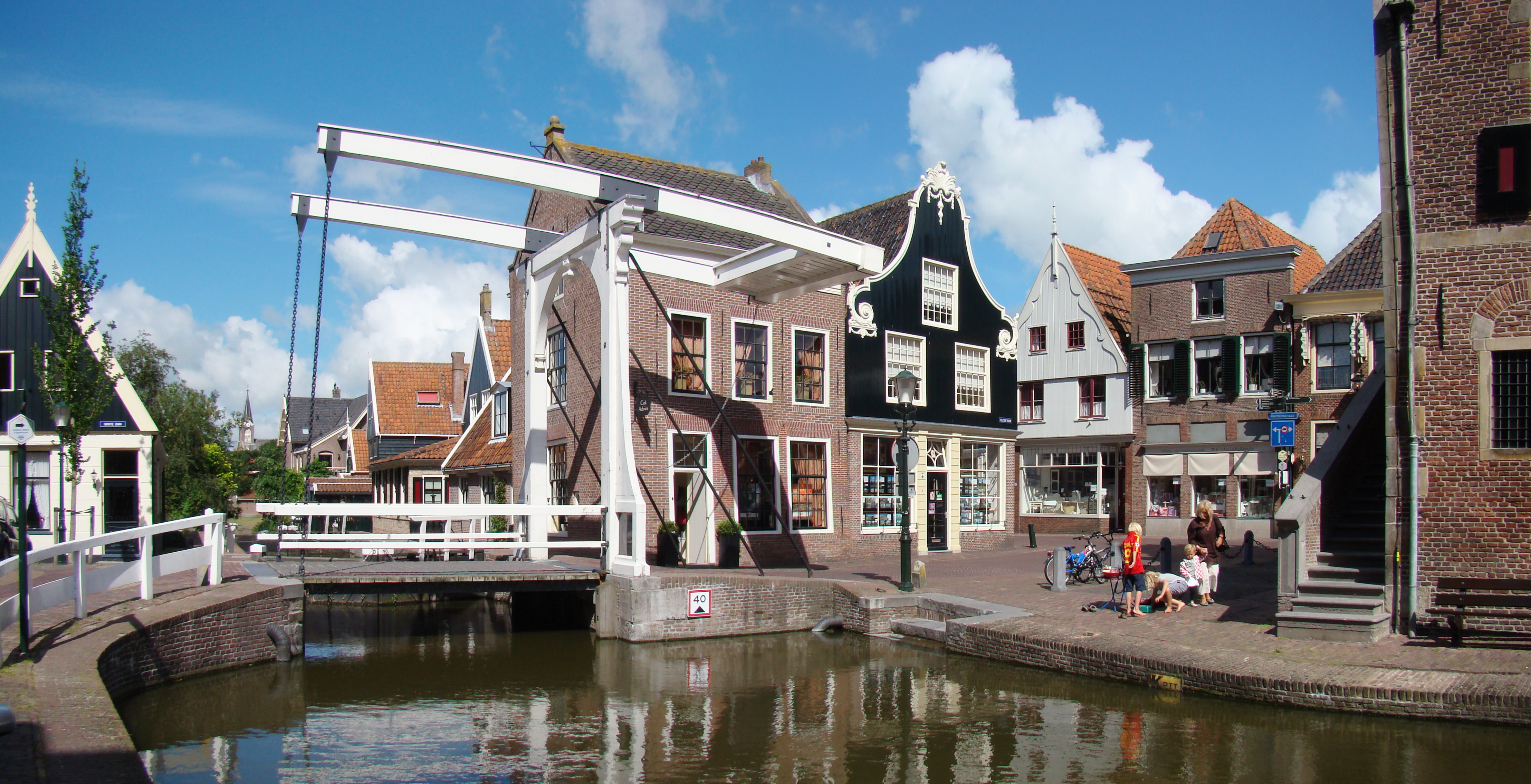 Rijksmonumenten in De Rijp, Monumental buildings in De Rijp, Netherlands This is an image of rijksmonument number 17091